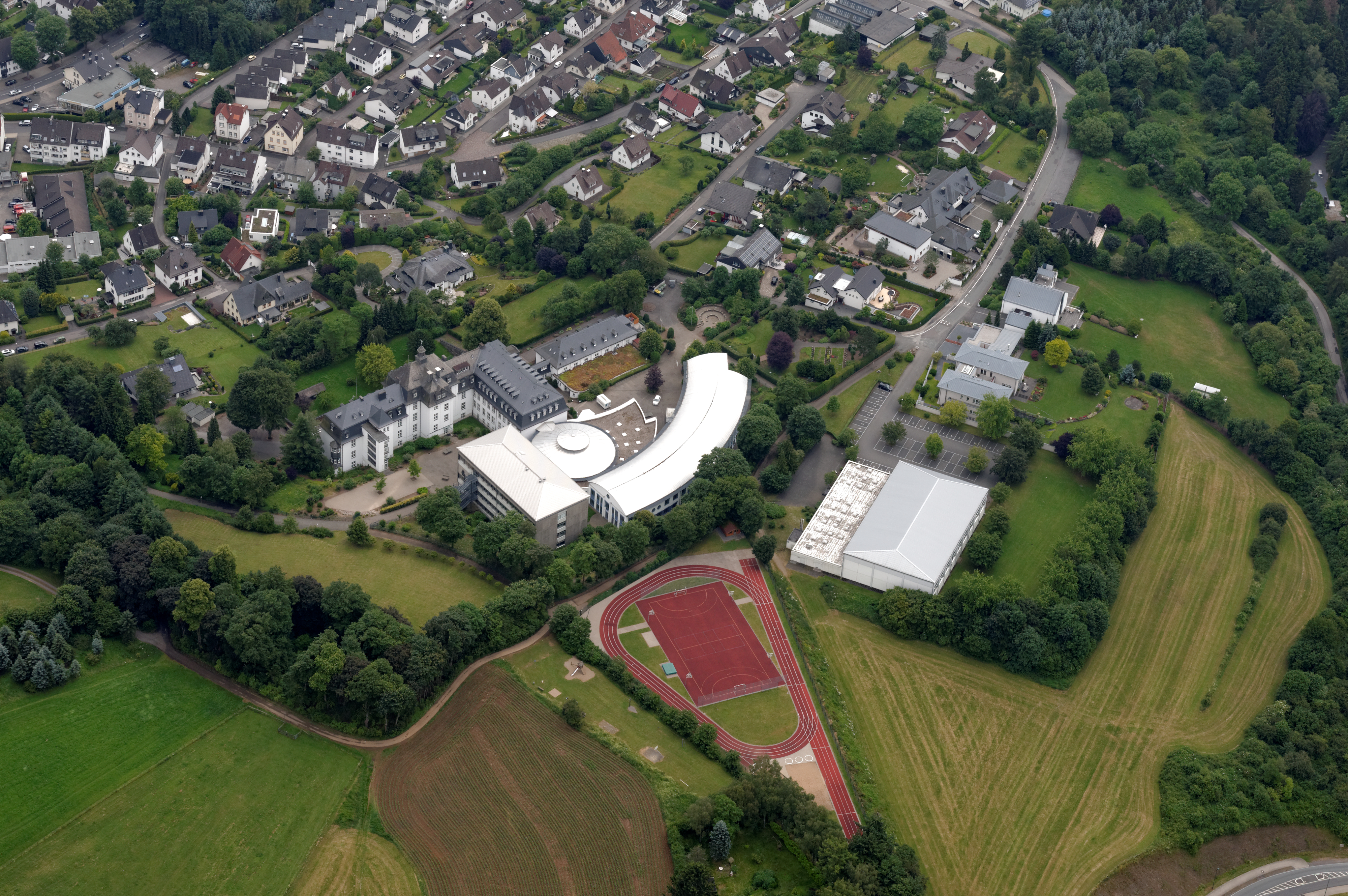 Fotoflug Sauerland Nord. Attendorn: St.-Ursula-Gynmasium, Sportanlage, Blickrichtung Ost The making of this document was supported by the Community-Budget of Wikimedia Germany.